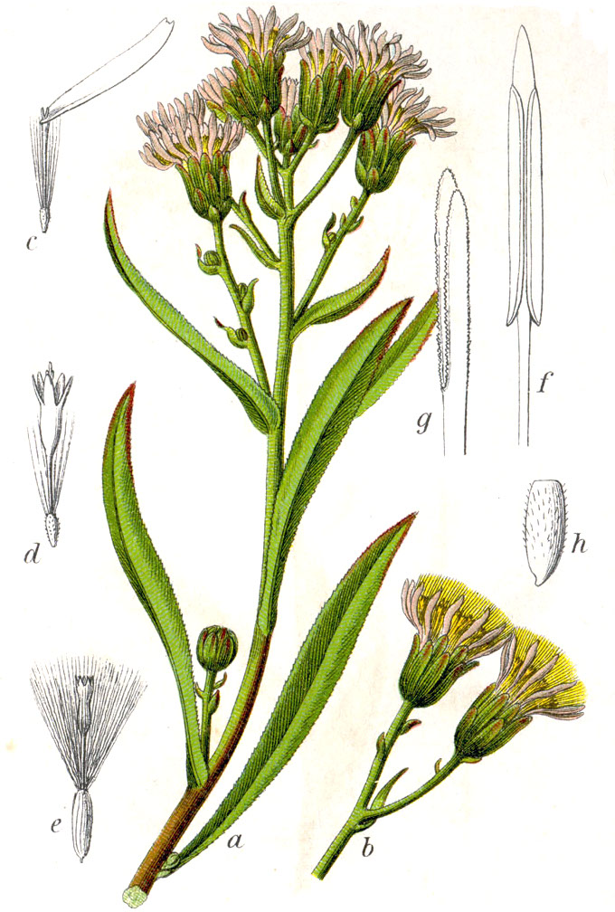 Tripolium pannonicum subsp. tripolium (L.) Greuter, syn. Aster tripolium L. Original Caption Salz-Aster, Aster tripolium